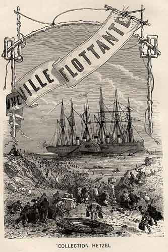 ilustrace Julese Férata k románu J. Verna